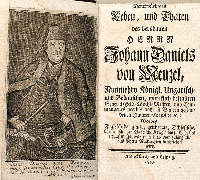 Johann Daniel von Menzel (1698-1744), ungarischer Husarengeneral, Biografie mit Stich, 1743